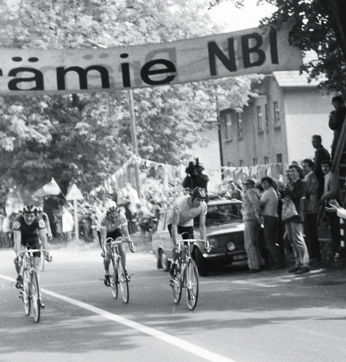 Prämiensprint in Fürstenberg/Havel auf der 12. Etappe der 35. Internationale Friedensfahrt (Course de la paix). v.l.: Falk Boden (DDR), Karoly Jenei (UNG), Olaf Ludwig (DDR)